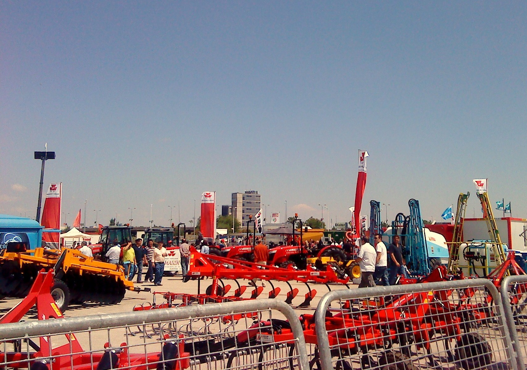 Exposición de maquinaria agrícola y ganadera en Expovicaman